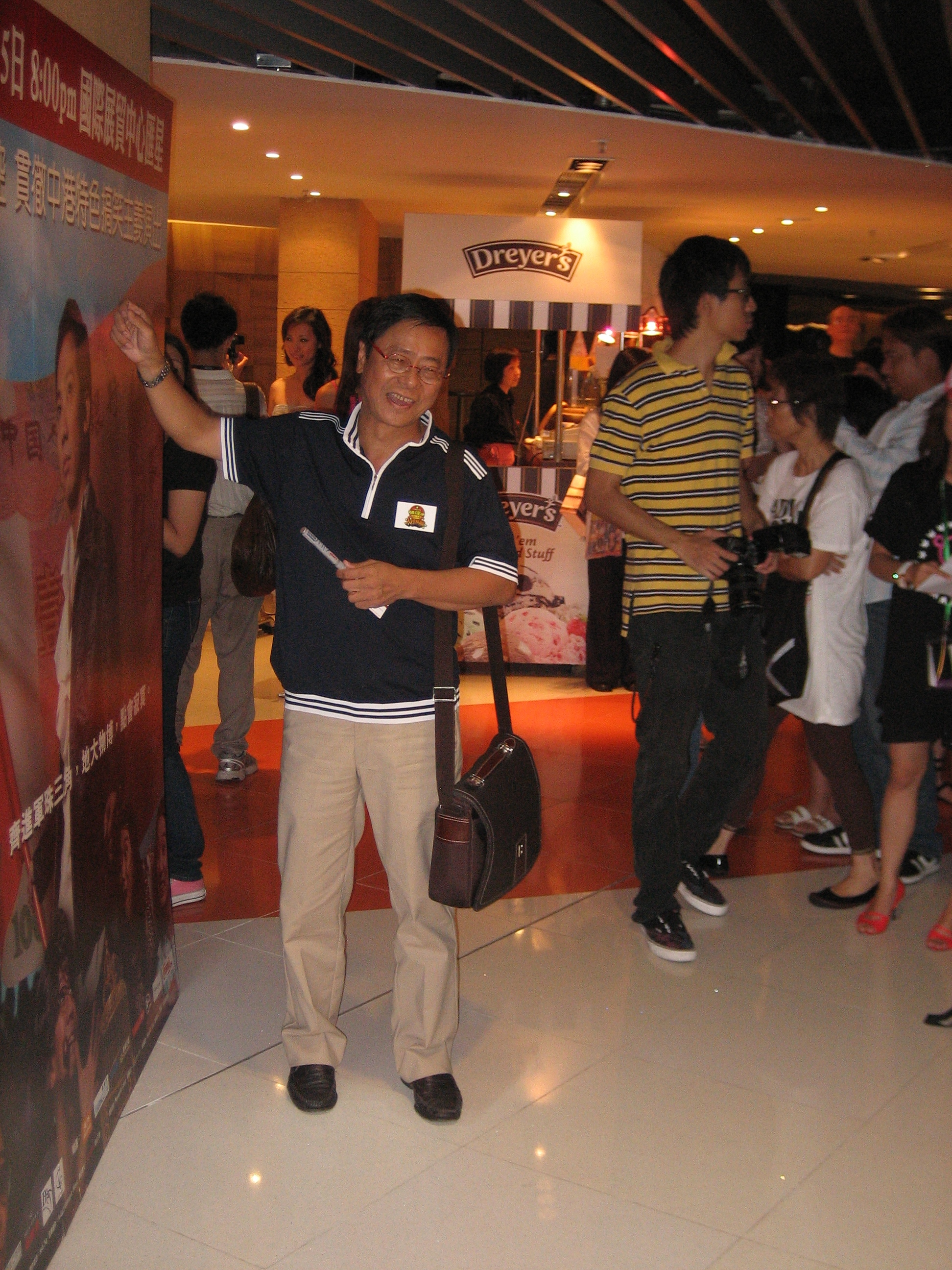 黄毓民